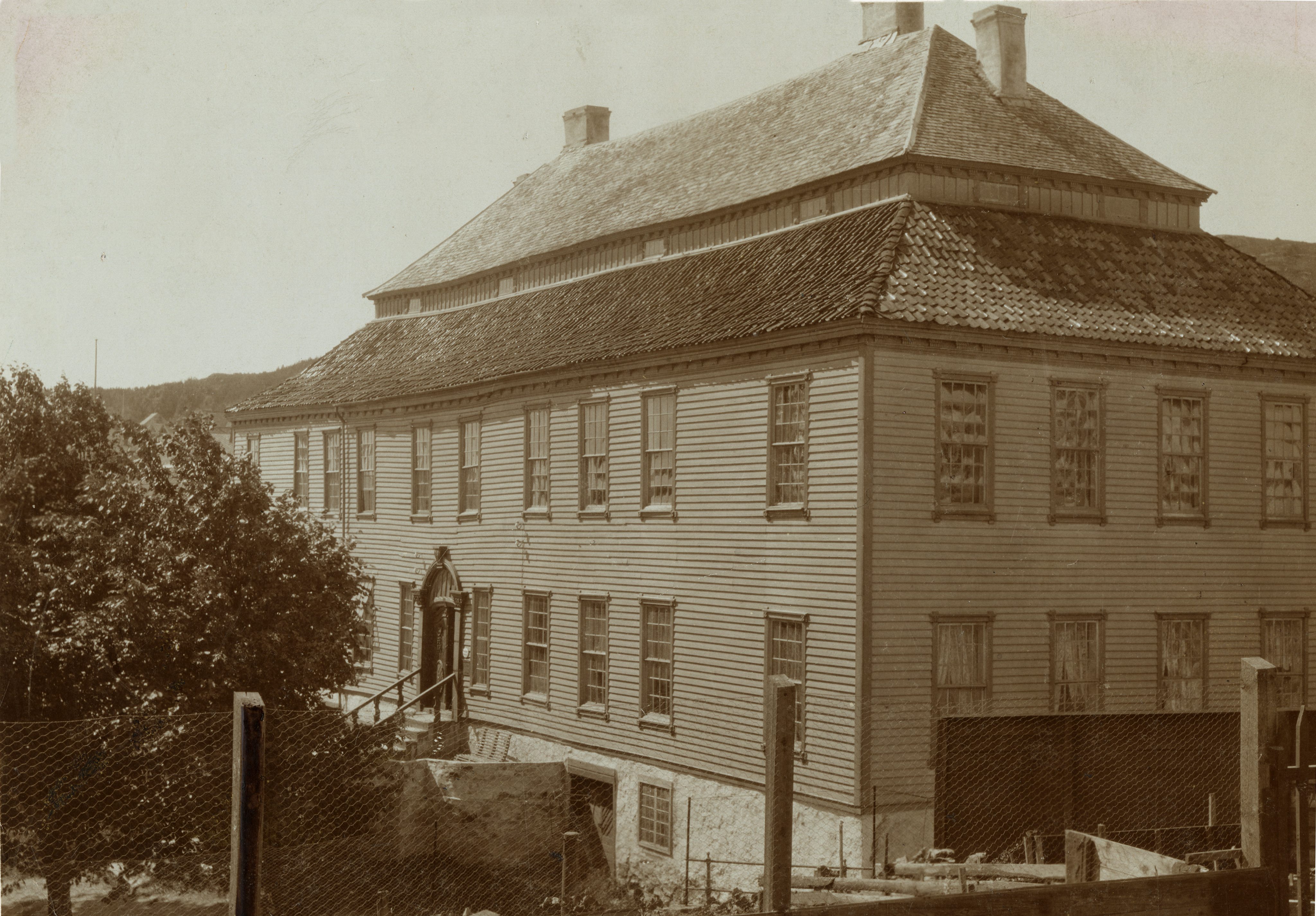 Husan, Farsund i Farsund, Vest-Agder Bygningen ble delvis ødelagt av brann i 1940. Seteritak This image on crowdsourcing geotagging platform Fotodugnad